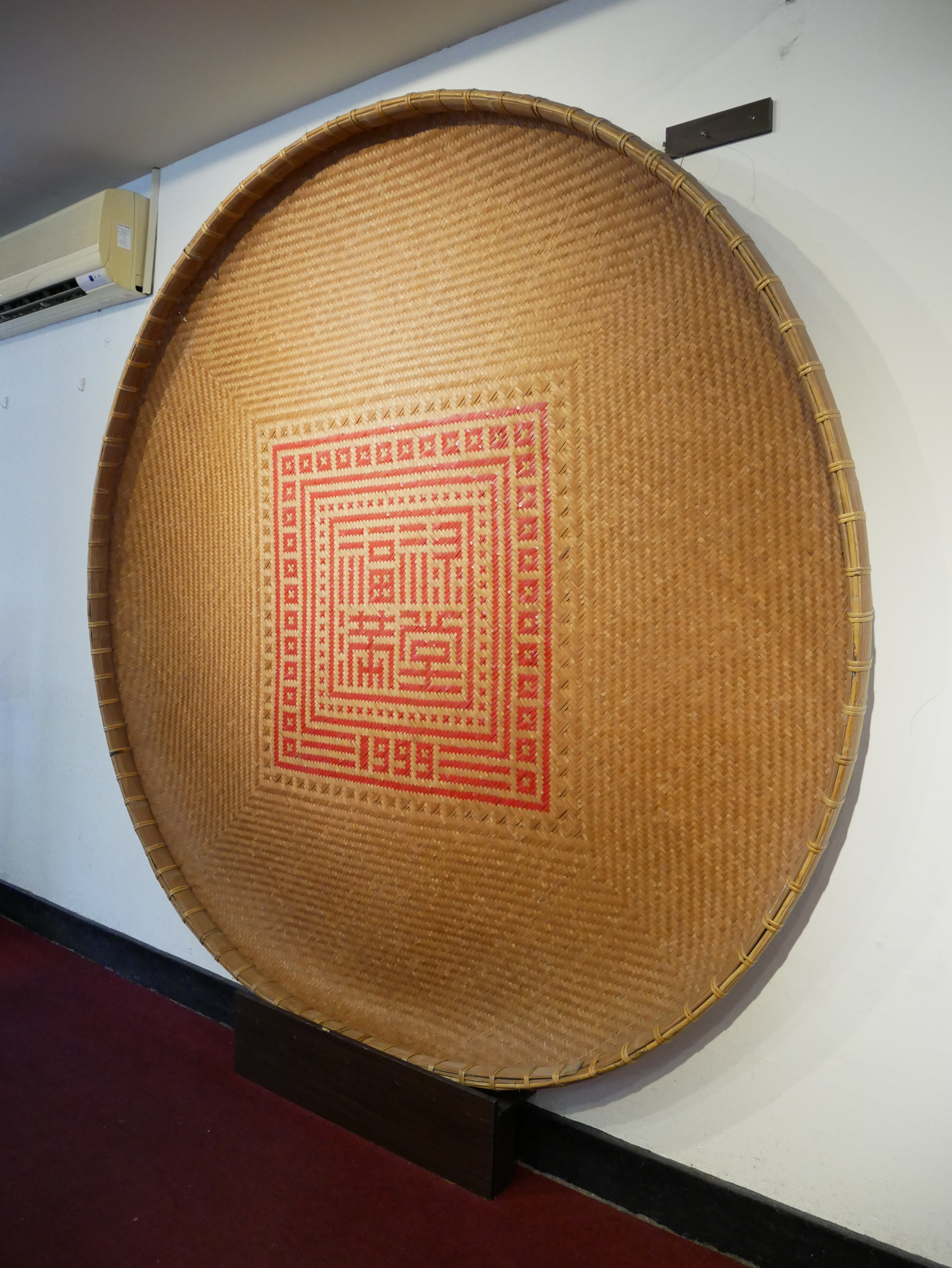 三峽區歷史文物館內鐘元興竹篩（1999年），新北市三峽區永館里